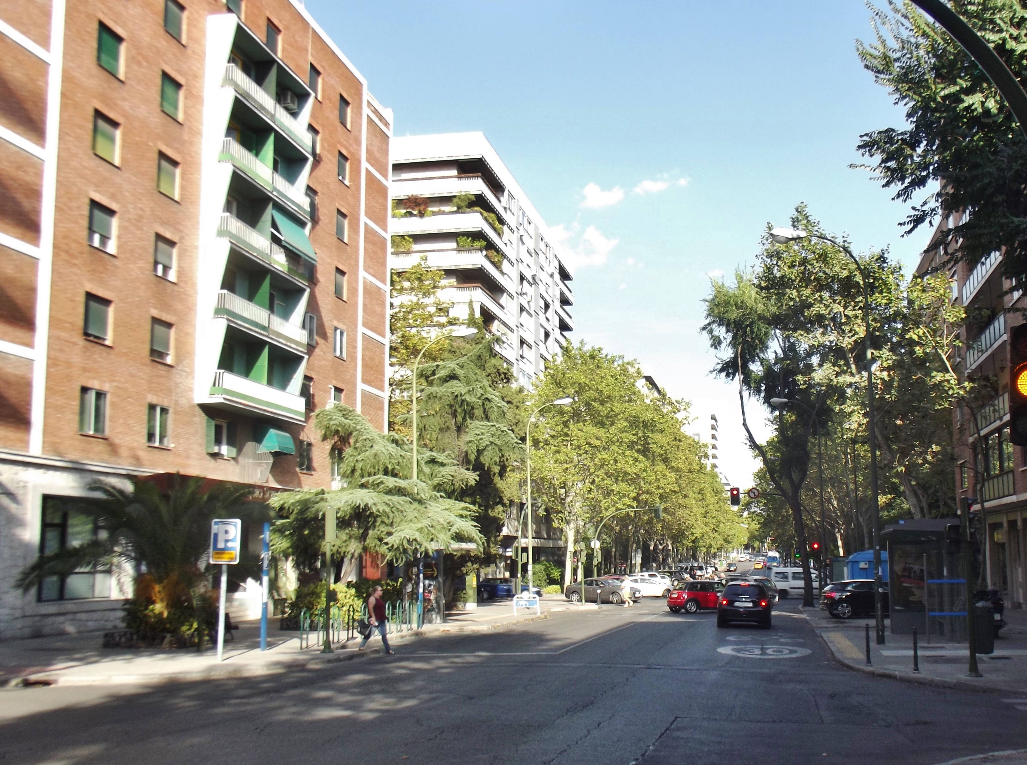 Calle del General Yagüe, Madrid.